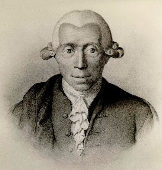 El naturalista español Pedro Franco Dávila (1711-1786) fundador y primer director del Real Gabinete de Historia Natural de Madrid.